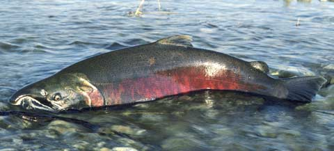 川を遡上してきたベニザケの成熟個体 英名:Coho salmon、Silver salmon、学名:Oncorhynchus kisutch コディアック国立野生動物保護区（米国、アラスカ州）。 Kodiak National Wildlife Refuge, Alaska